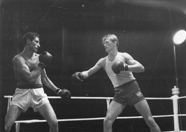 Pietrzykowsky, Raduly Zentralbild III 15 Motive 2.10.1954 Internationales Boxturnier im Wassil-Lewski-Stadion in Sofia im September 1954 (Bulgarien) Das grosse internationale Länderturnier im Boxen wurde am 22. September abgeschlossen. Die polnische Staffel belegte mit 10:0 Punkten den ersten Platz. An zweiter Stelle steht die Sowjetunion, gefolgt von Bulgarien, Ungarn, der Tschechoslowakischen Republik und der Mannschaft der Deutschen Demokratischen Republik. UBz: Boxkampf zwischen Pietrzykowsky (Polen) und Raduly (Ungarn), Mittelgewicht.